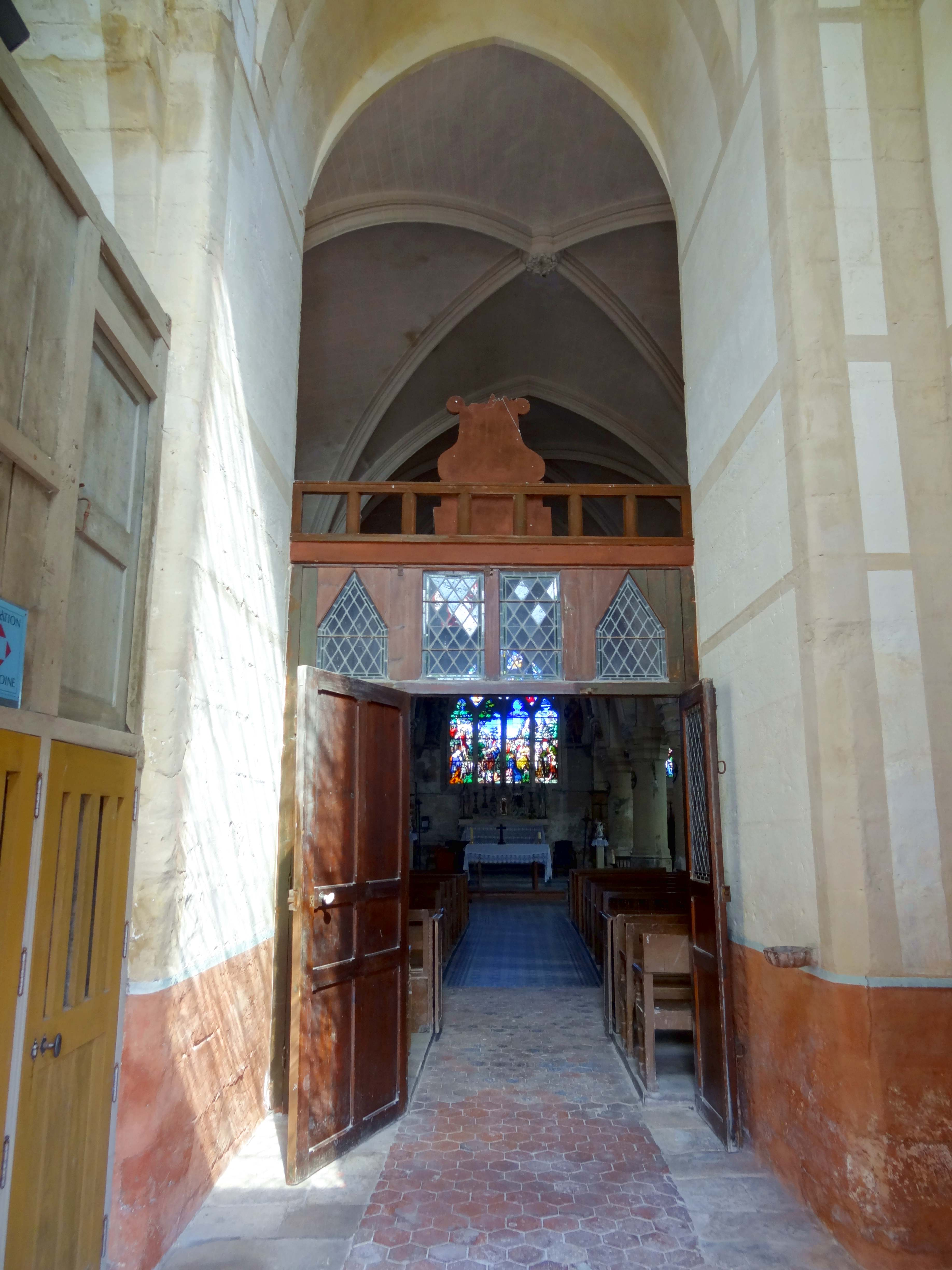 Intérieur de l'église - voir titre.